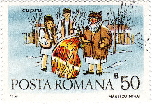 Source: Post of Romania